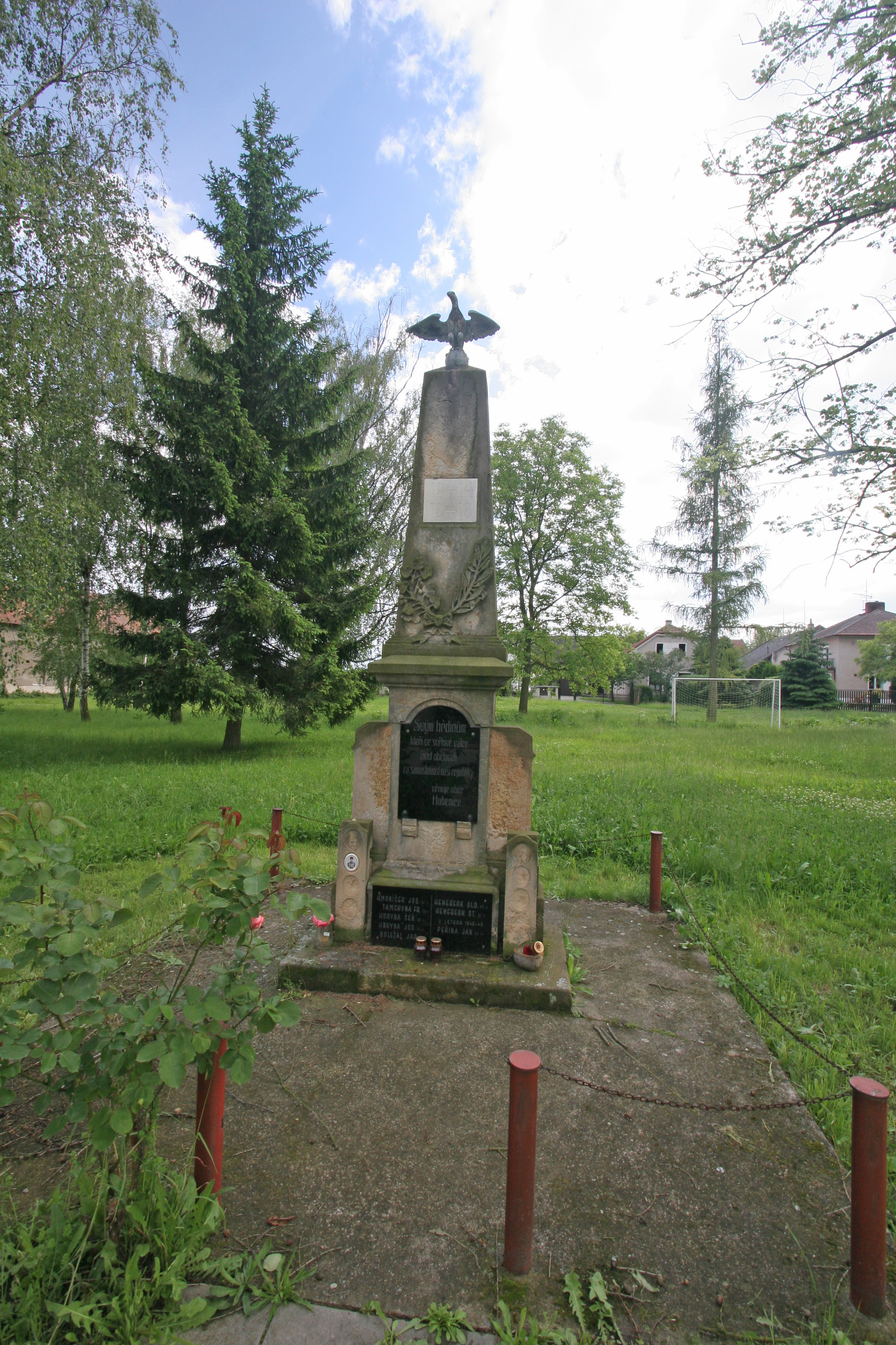 Hubenice pomník padlých